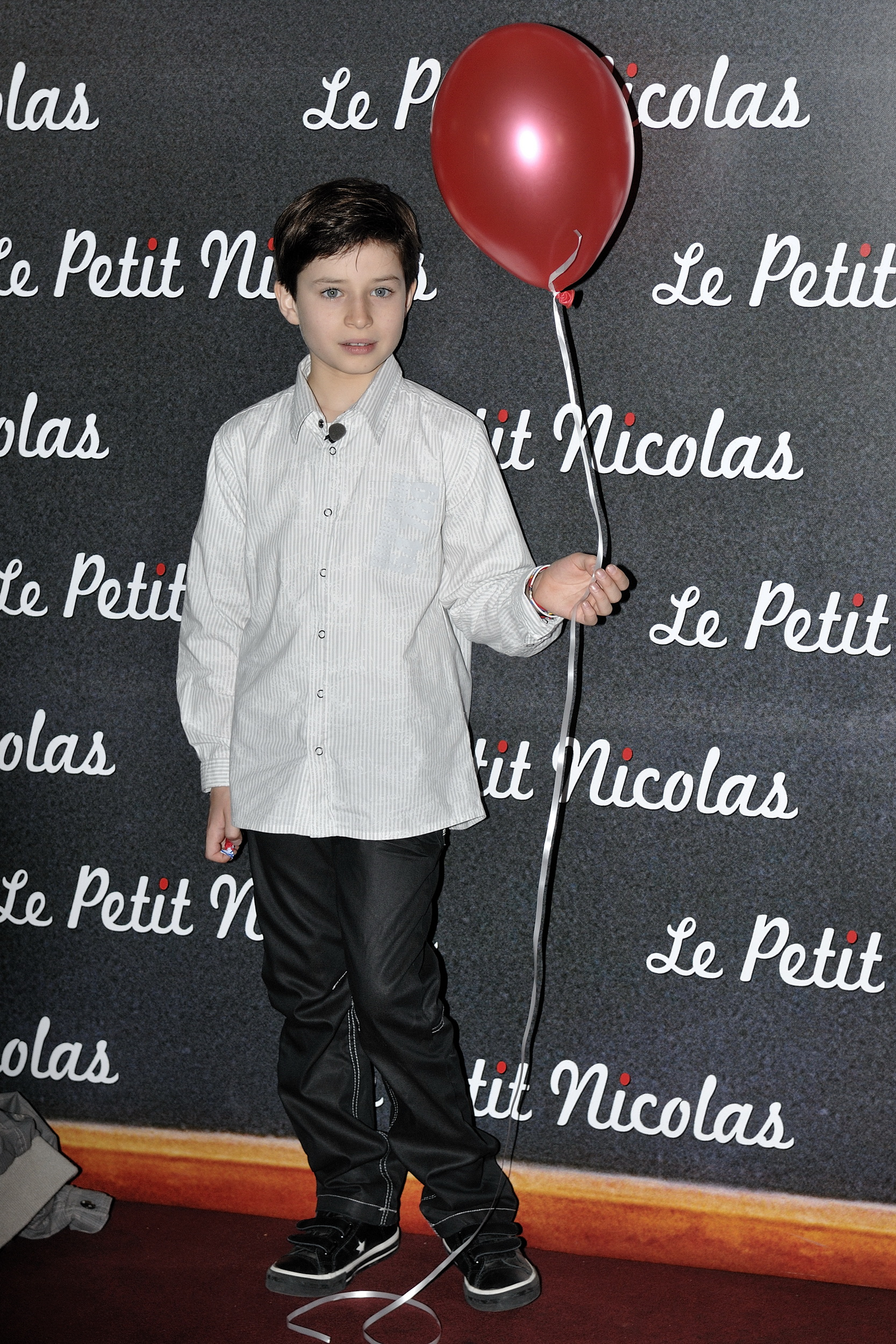 Avant Première du film Le petit Nicola's au Grand Rex, à Paris, le 20 Septembre 2009, en présence de toute l'équipe de film. Ici Maxime Godart.